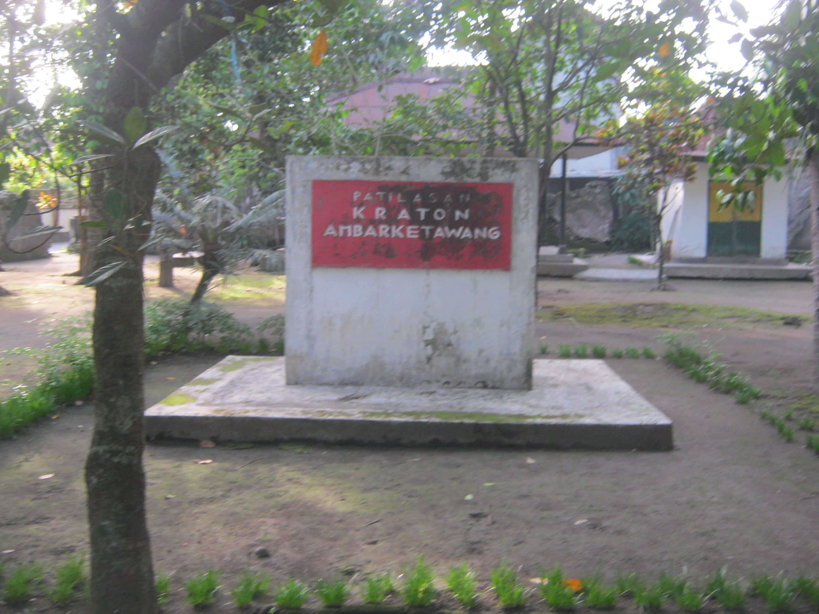 Pesanggrahan ini dibangun oleh Pangeran Mangkubumi dan sekarang dalam keadaan rusak